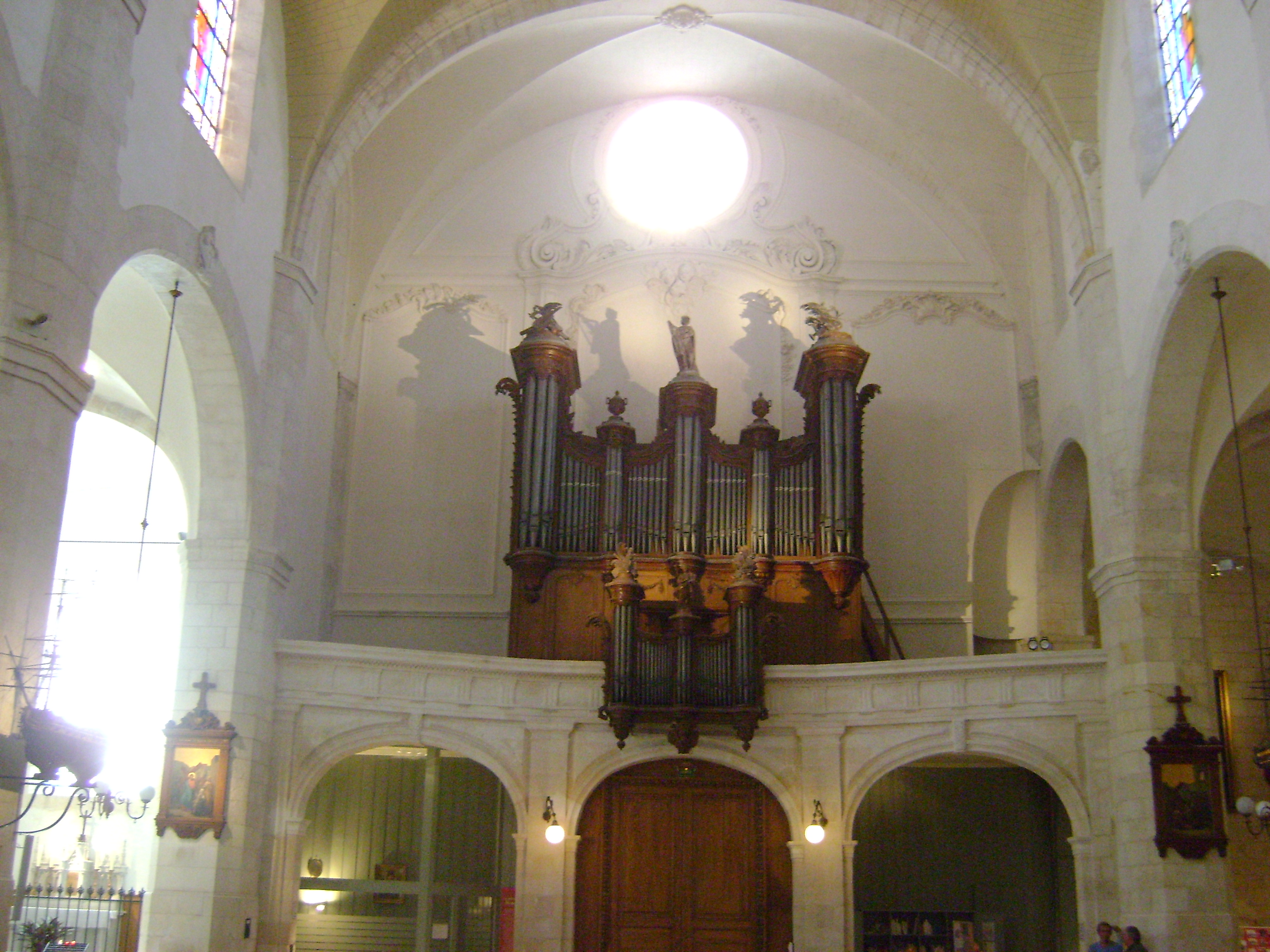 Eglise Saint-Sauveur de la Rochelle This building is en partie classé, en partie inscrit au titre des Monuments Historiques. . et son orgue